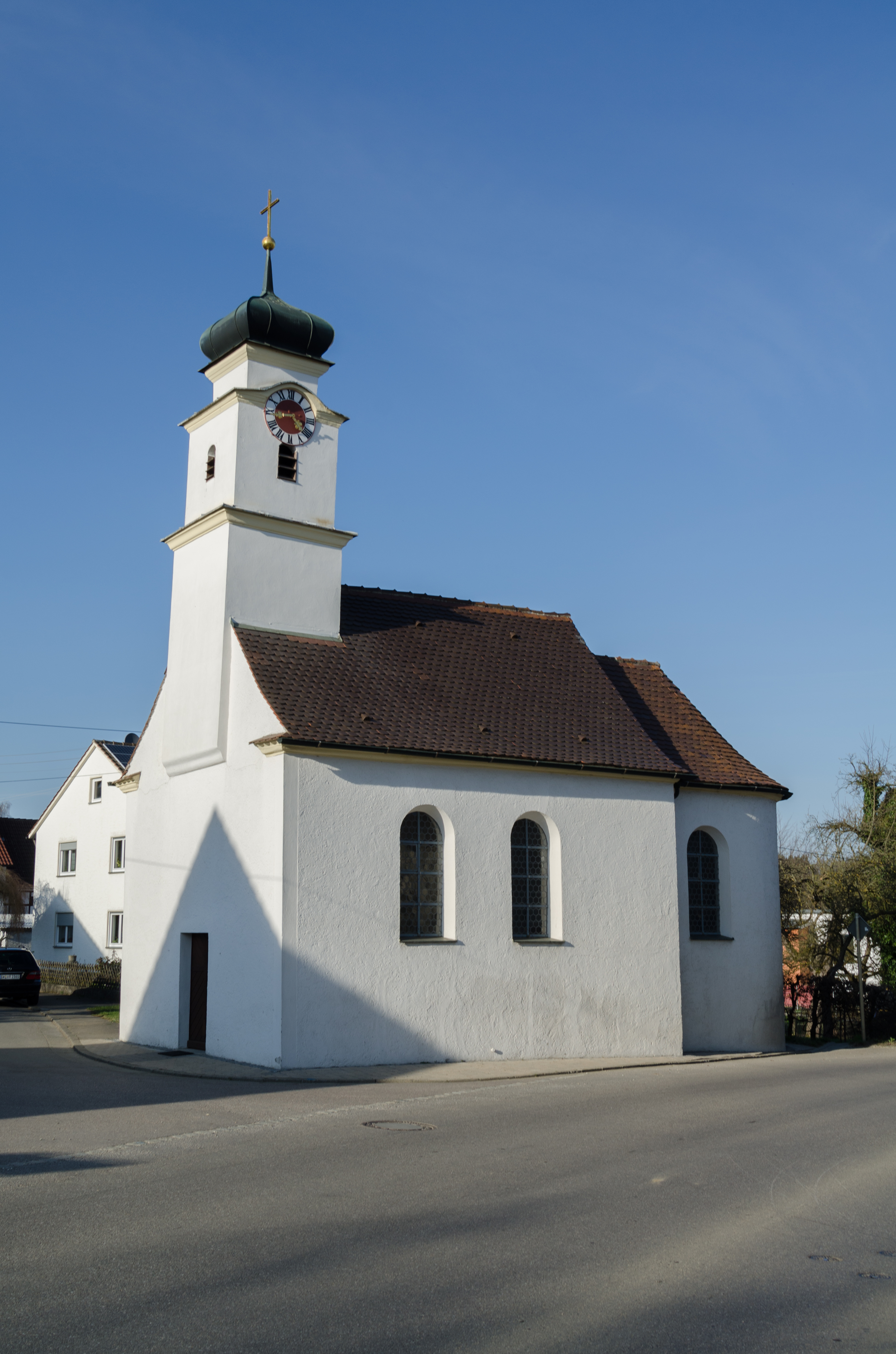 Pfaffenhofen a.d.Roth, Raunertshofen, Günzburger Straße 3